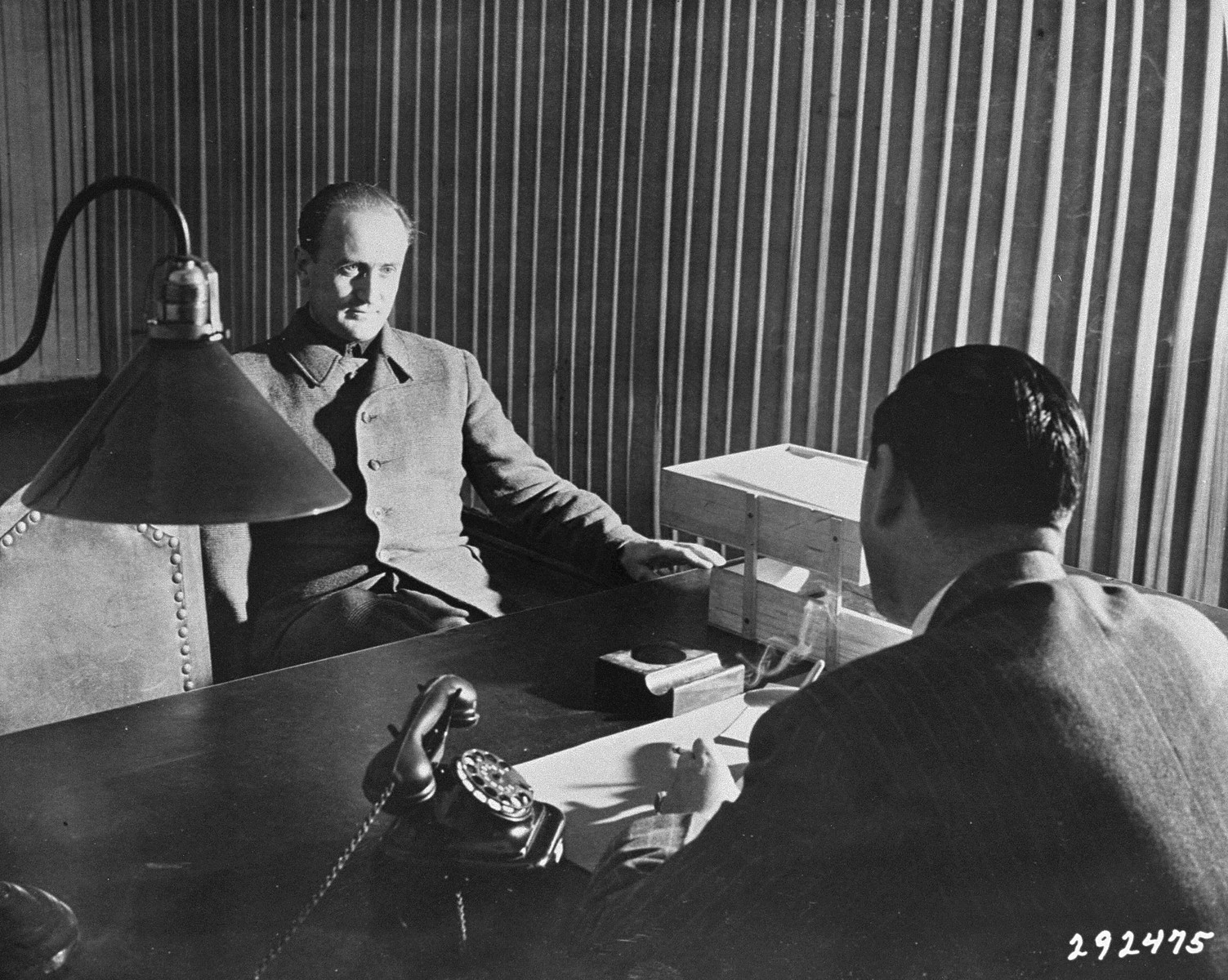 16. Oktober 1947: Arthur Axmann, ehemaliger Reichsjugendführer, wird in Nürnberg zu Hitlers Tod befragt.